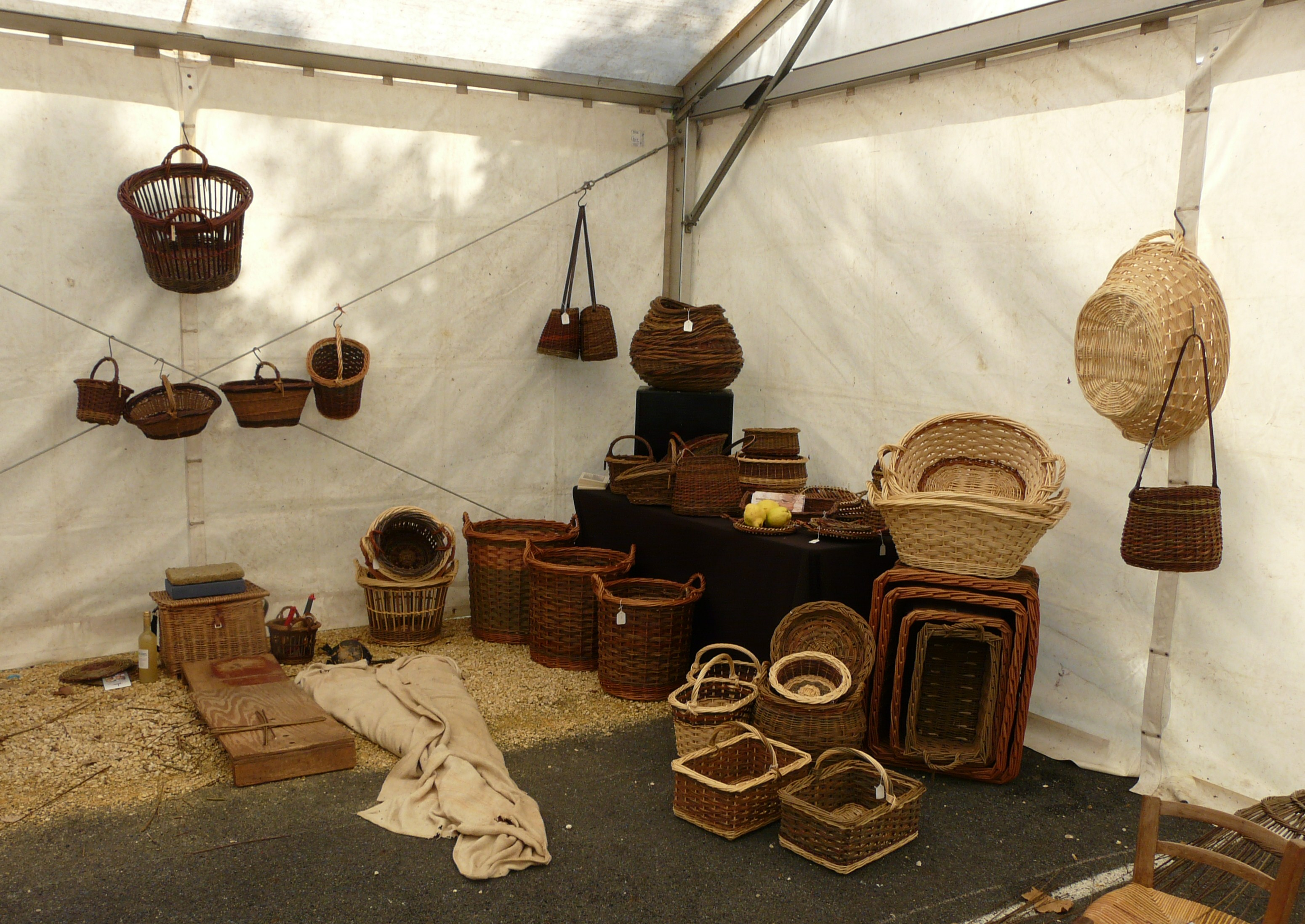 Exposition de paniers lors de la Fête des paniers 2016, Sainte-Eulalie-d'Ans, Dordogne, France.